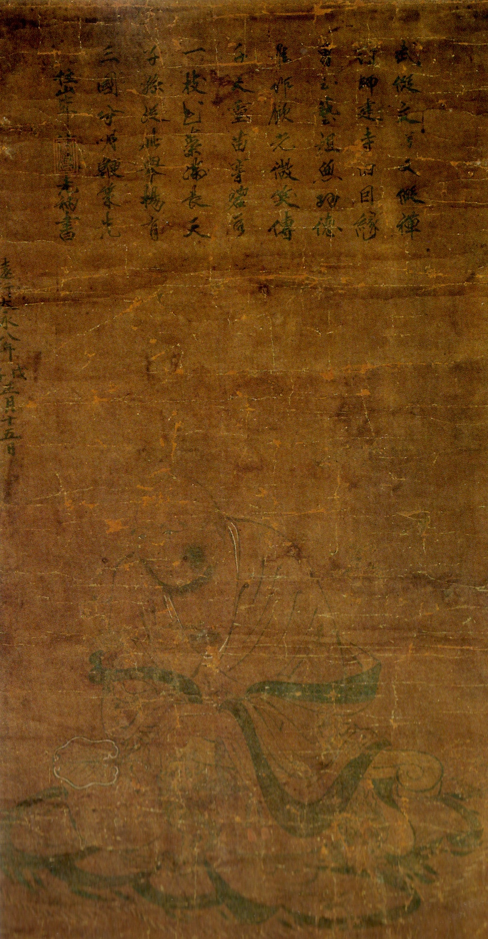 長尾景長の肖像。